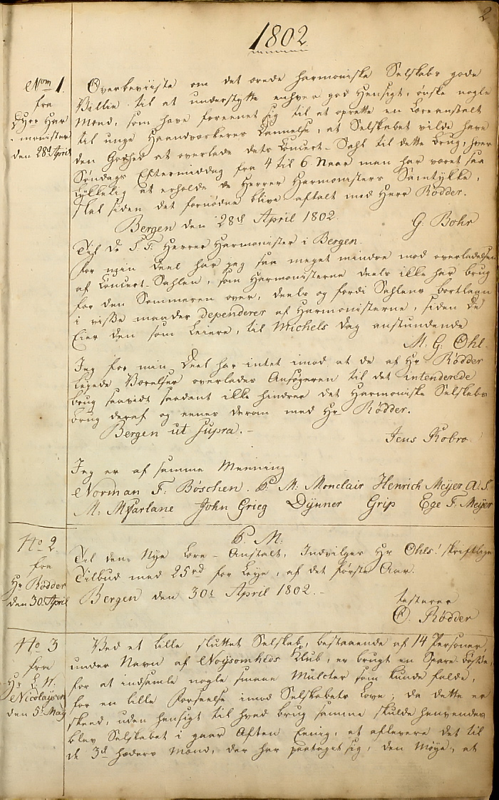 En side fra kopibok for innkomne brev, 1802, fra arkivet etter Bergen søndagsskole, oppbevart ved Bergen Byarkiv